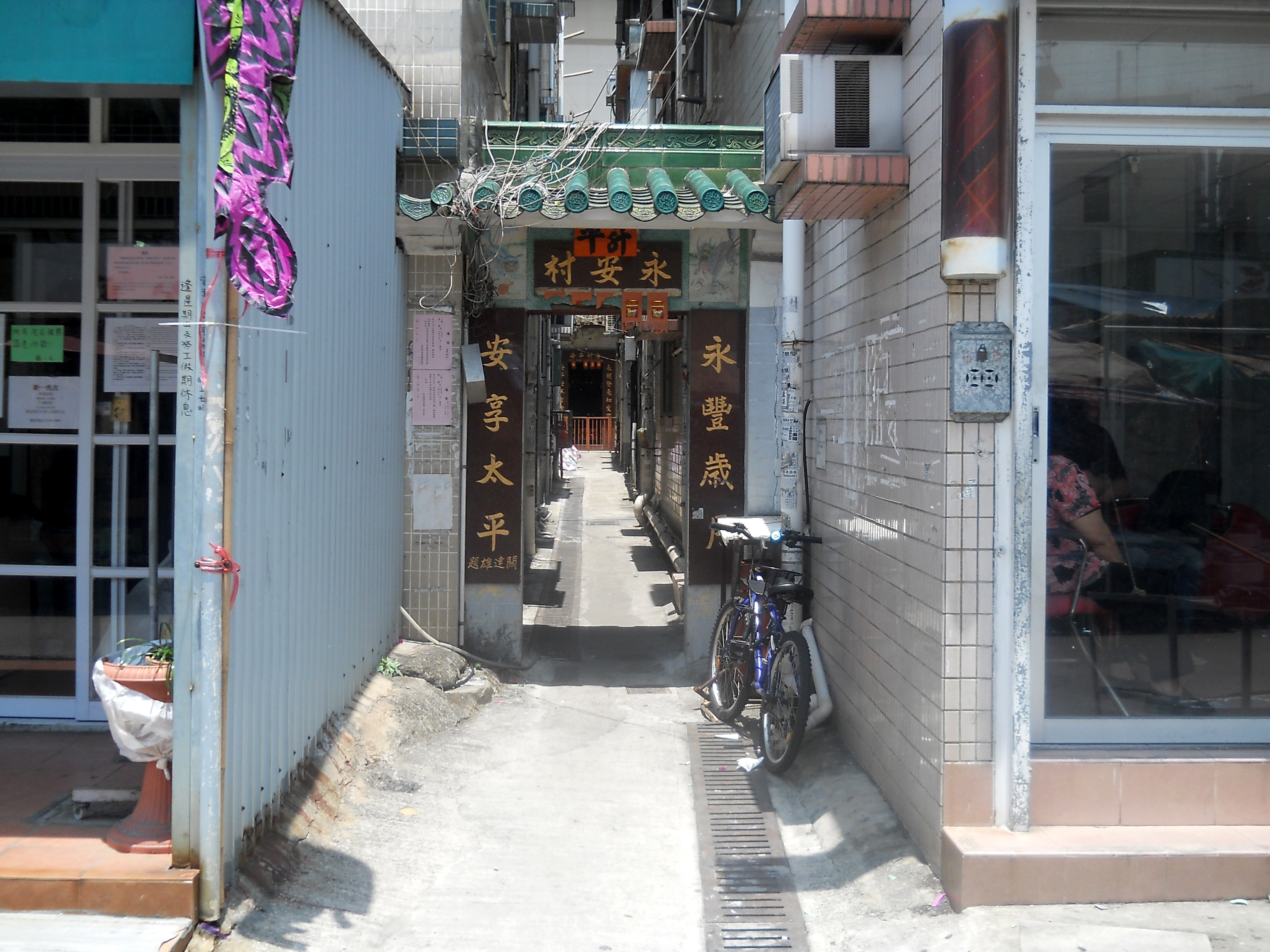 中文（香港）: 藍地永安村